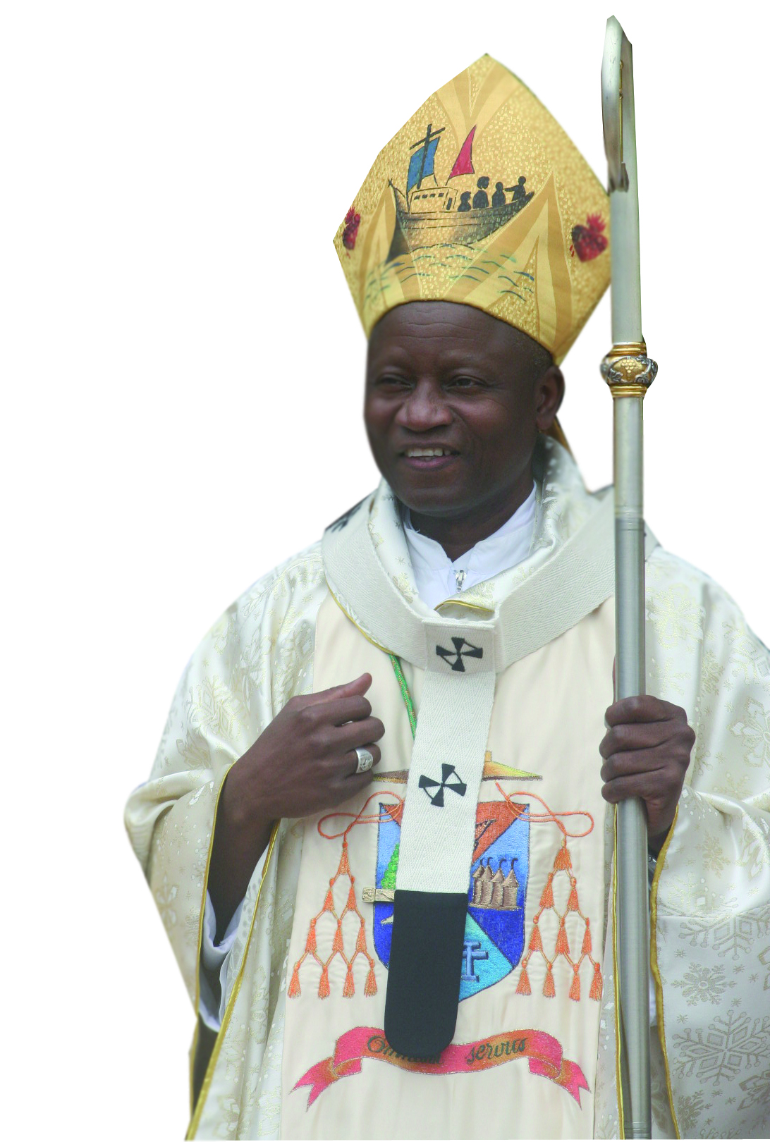 Mgr Pascal N'KOUE actuel archeveque de Parakou au Bénin.